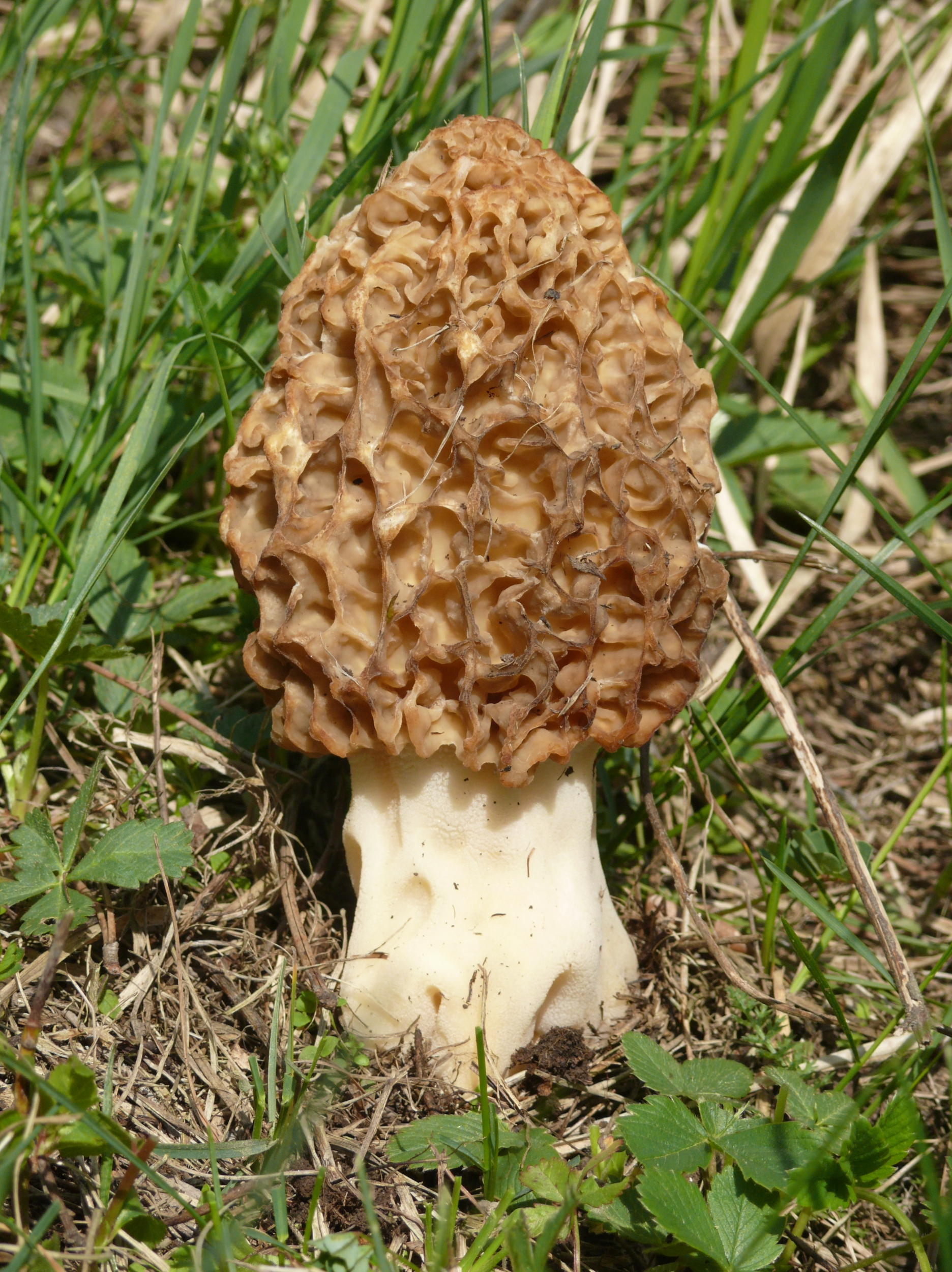 Morchella esculenta, Tauberland, Deutschland